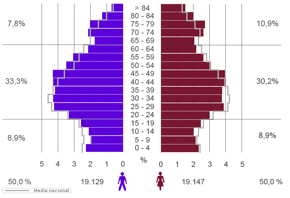 Pirámide poblacional de Miranda de Ebro a 2006 según el Informe de Datos Económicos y Sociales de los Municipios de España realizando por Caja España.